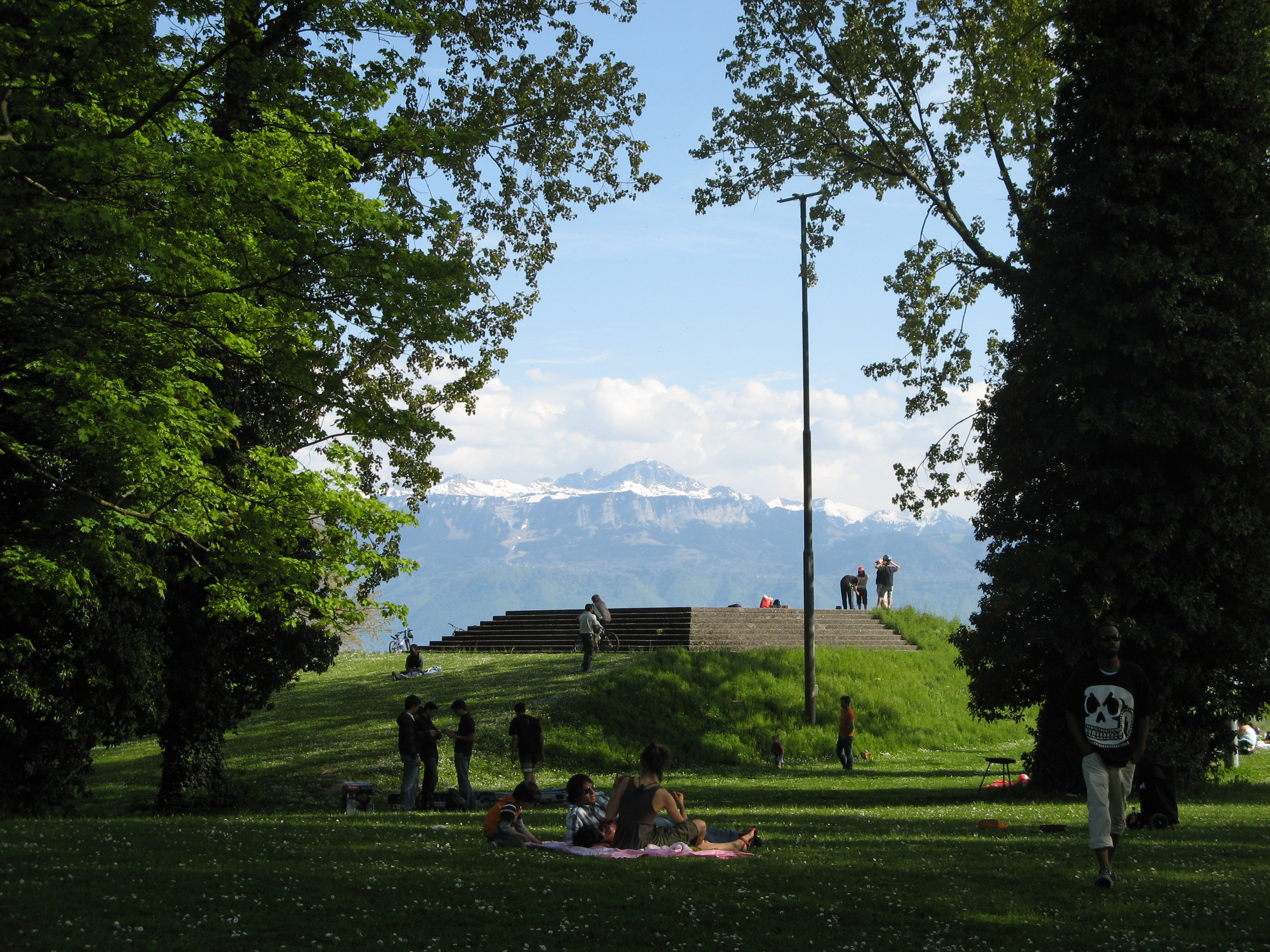 Vidy, Lausanne, Switzerland.